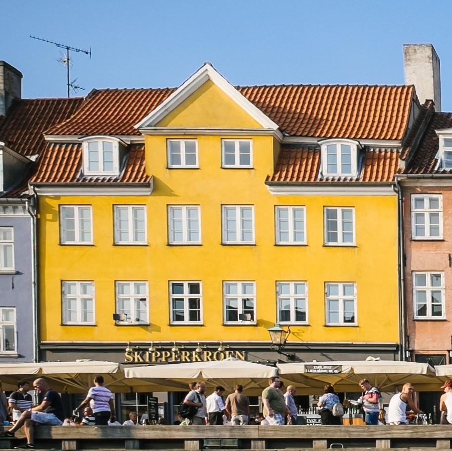 Nyhavn 27 in Copenhagen, Denmark Copenhagen, Denmark